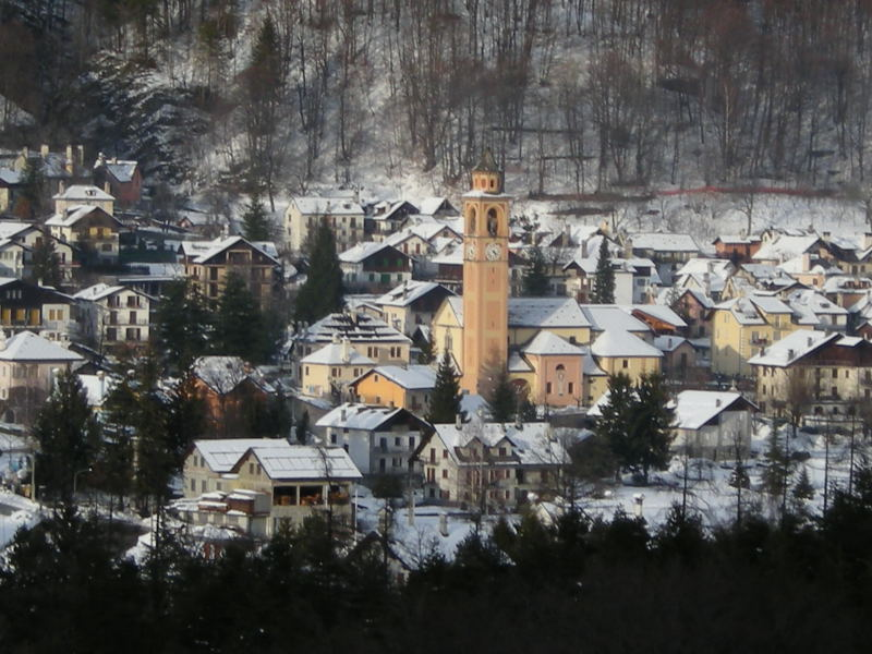 L'abitato di Druogno (VB)